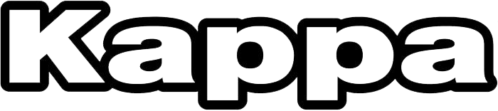 Kappa es una marca italiana de ropa deportiva y expandida a otros segmentos textiles, fundada en 1916 bajo el nombre de Maglificio Calzificio Torinese (MCT), por la familia Vitale.